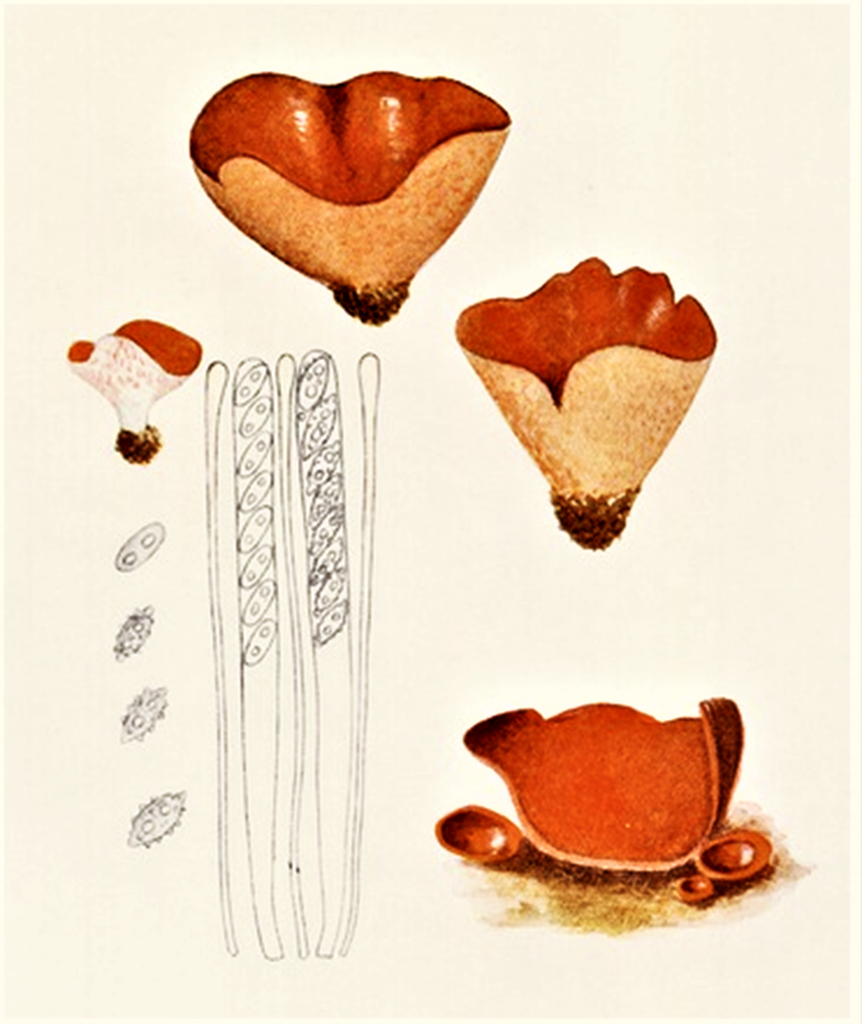 Bres.: Peziza aurantia Pers. (1800), heute Aleuria aurantia (Pers.) Fuckel (1870)